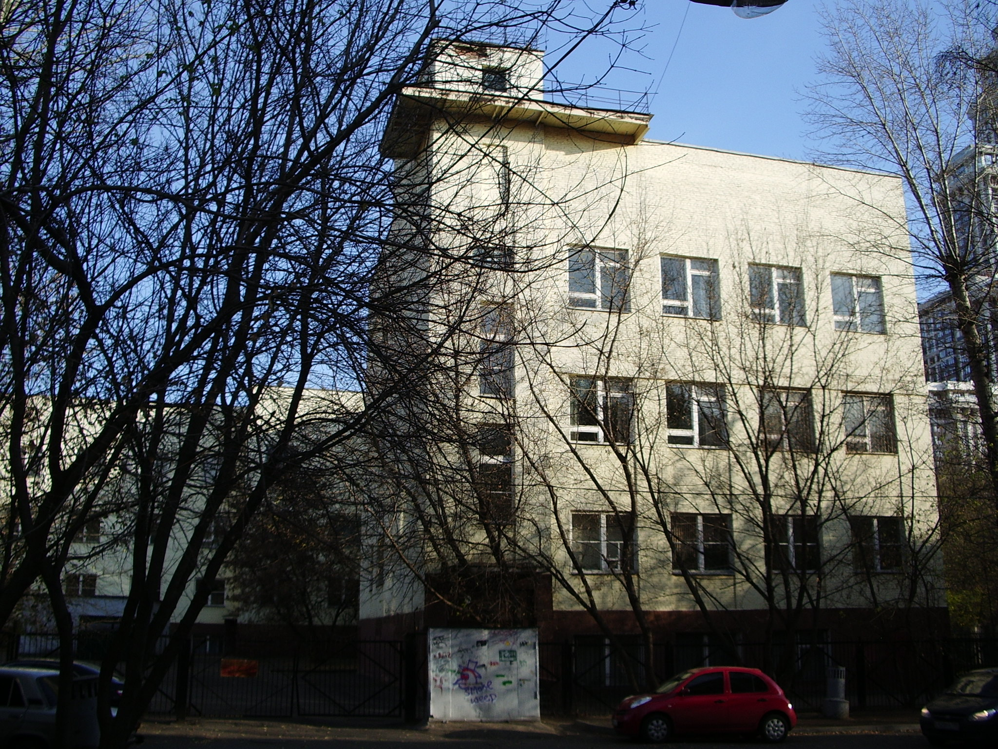 Школа № 1249. Москва, Чапаевский переулок, дом 6